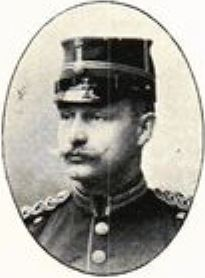 Anton Pihlström (1862-1902), svensk militär